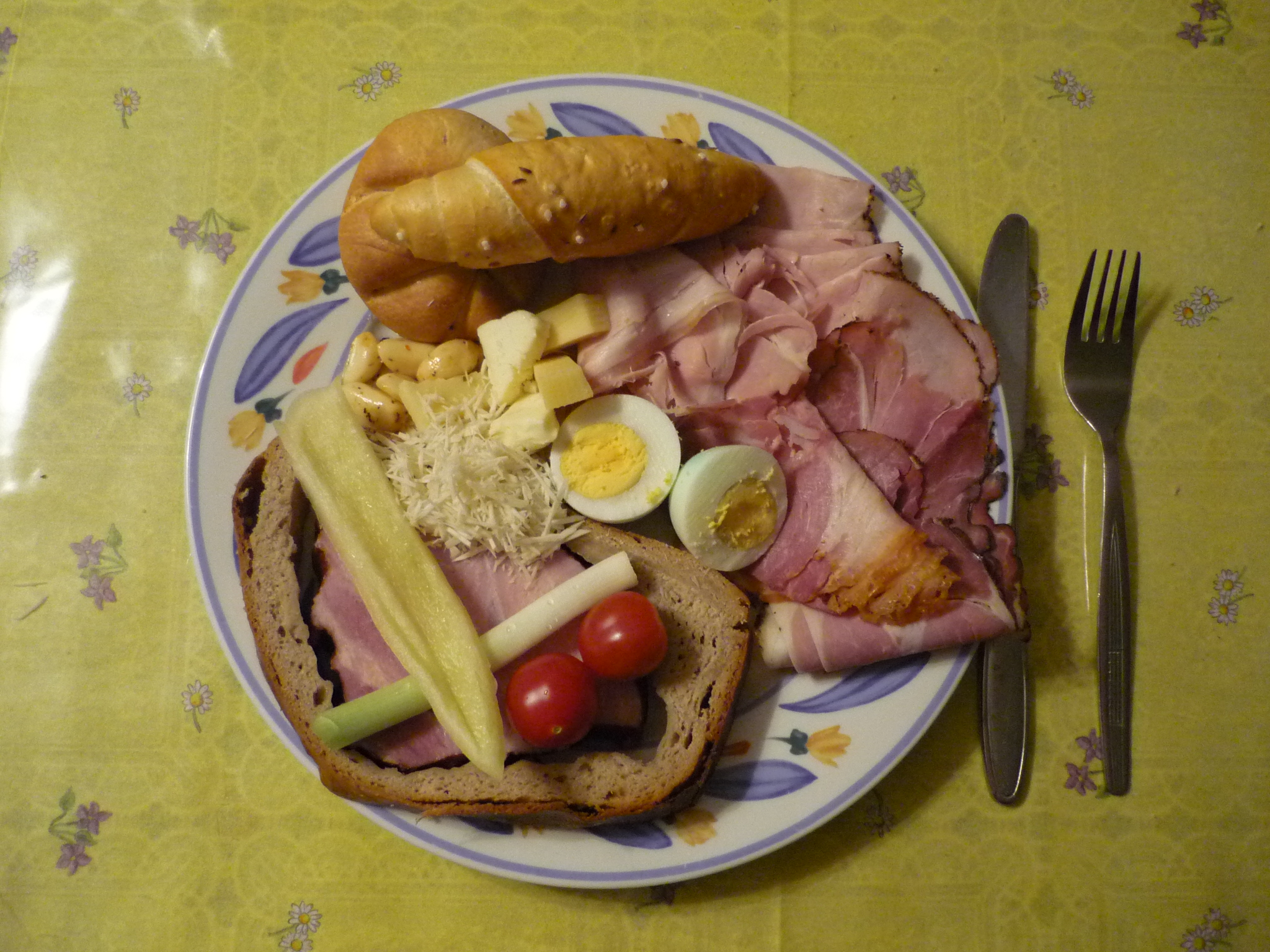 Ein typisches, österreichisches Ostermahl mit Osterschinken.